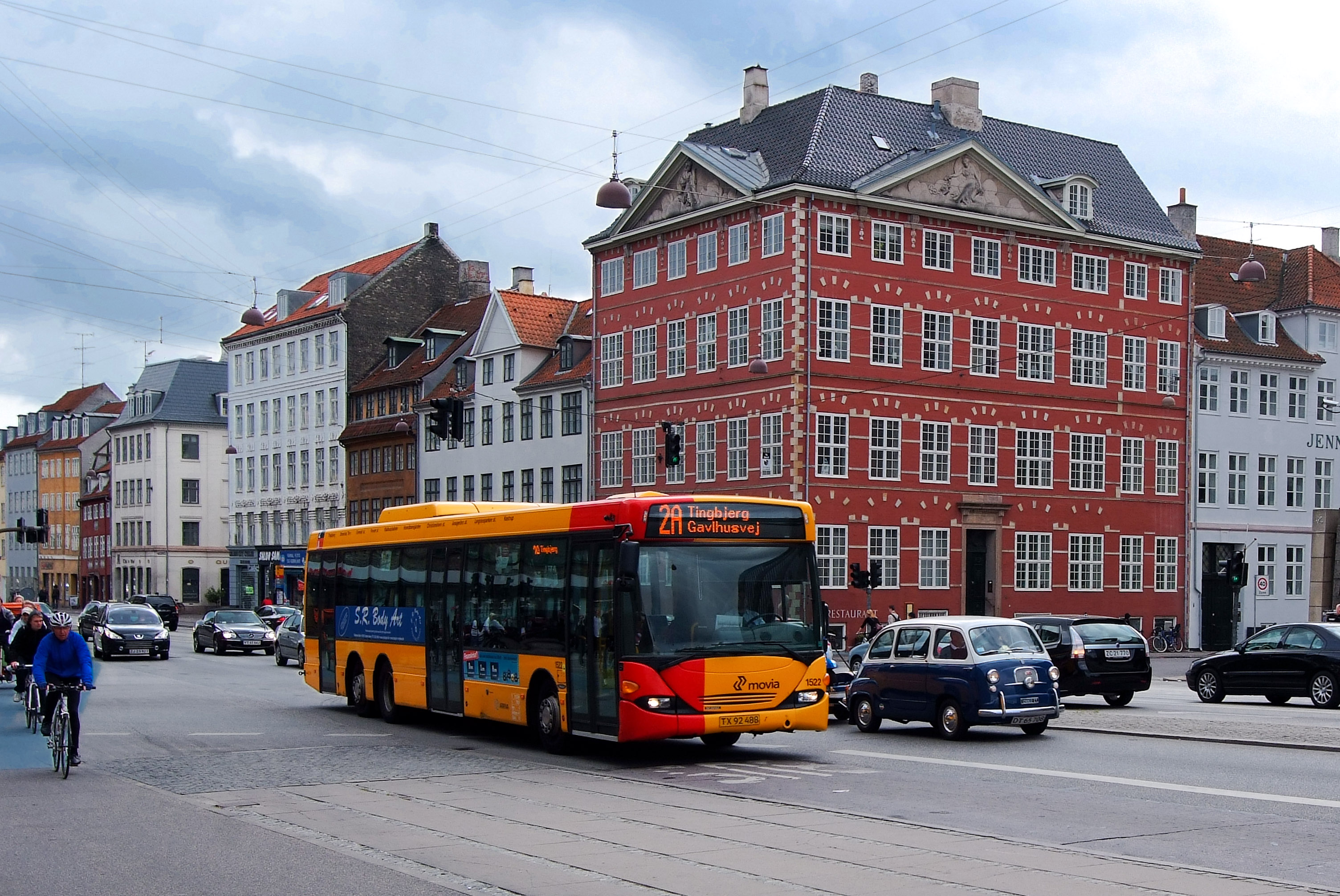 Den Rhodeske Gård (Strandgade 14) in the Christianshavn neighbourhood of Copenhagen, Denmark